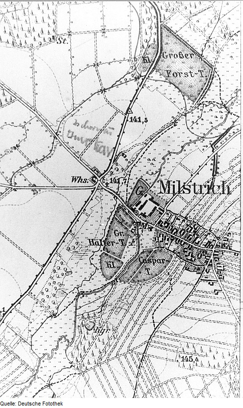 Original image description from the Deutsche Fotothek Oßling-Milstrich. Meßtischblatt, Sekt. Straßgräbchen, Nr. 21